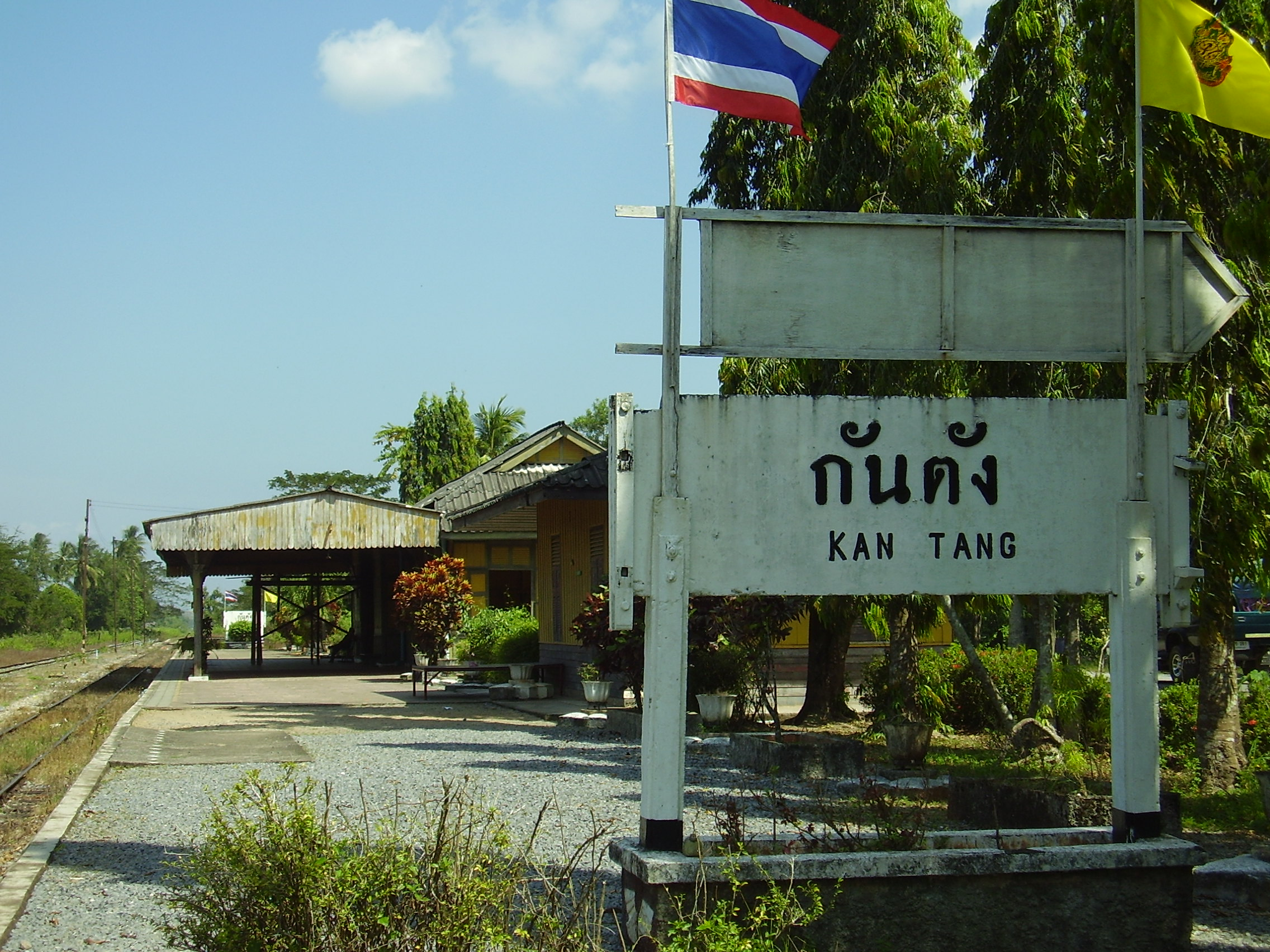 Kantang railway station